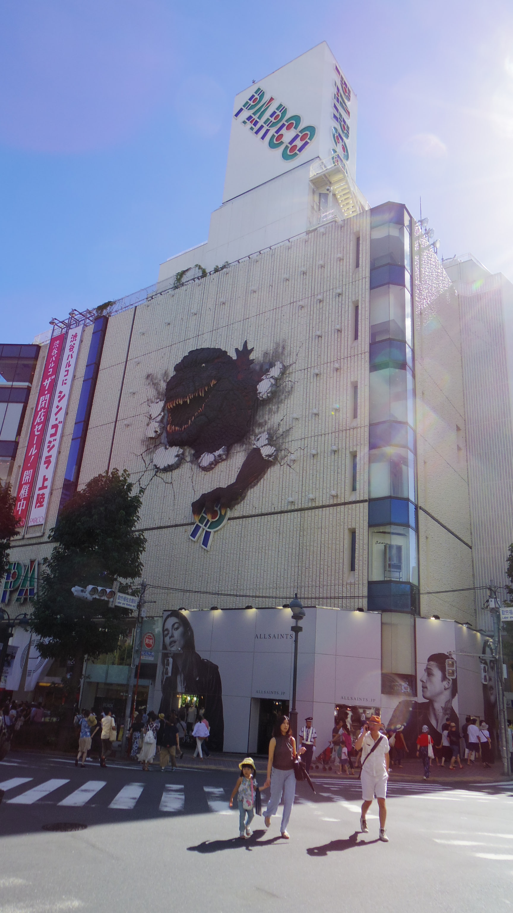 渋谷パルコ（東京都渋谷区宇田川町）の最終営業日（2016年8月7日）。このパルコ・パート1の建物には映画『シン・ゴジラ』公開に因み、シン・ゴジラの3Dアートが施された。